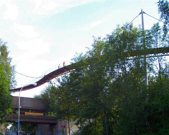 Erzbahnschwinge. Brücke an südlichen Ende der Erzbahn.